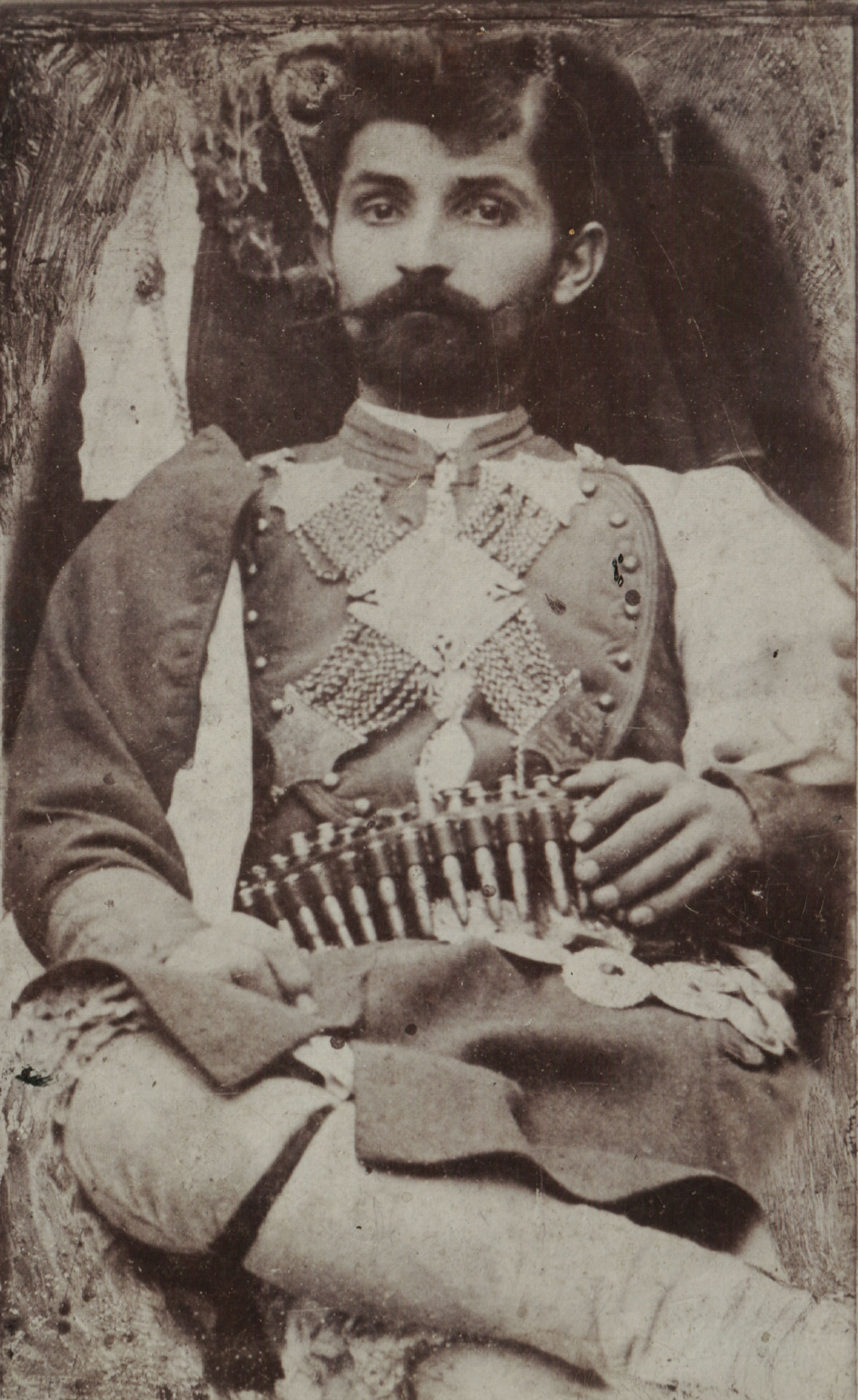 Снимка на Кузман Трифонов Стефанов.